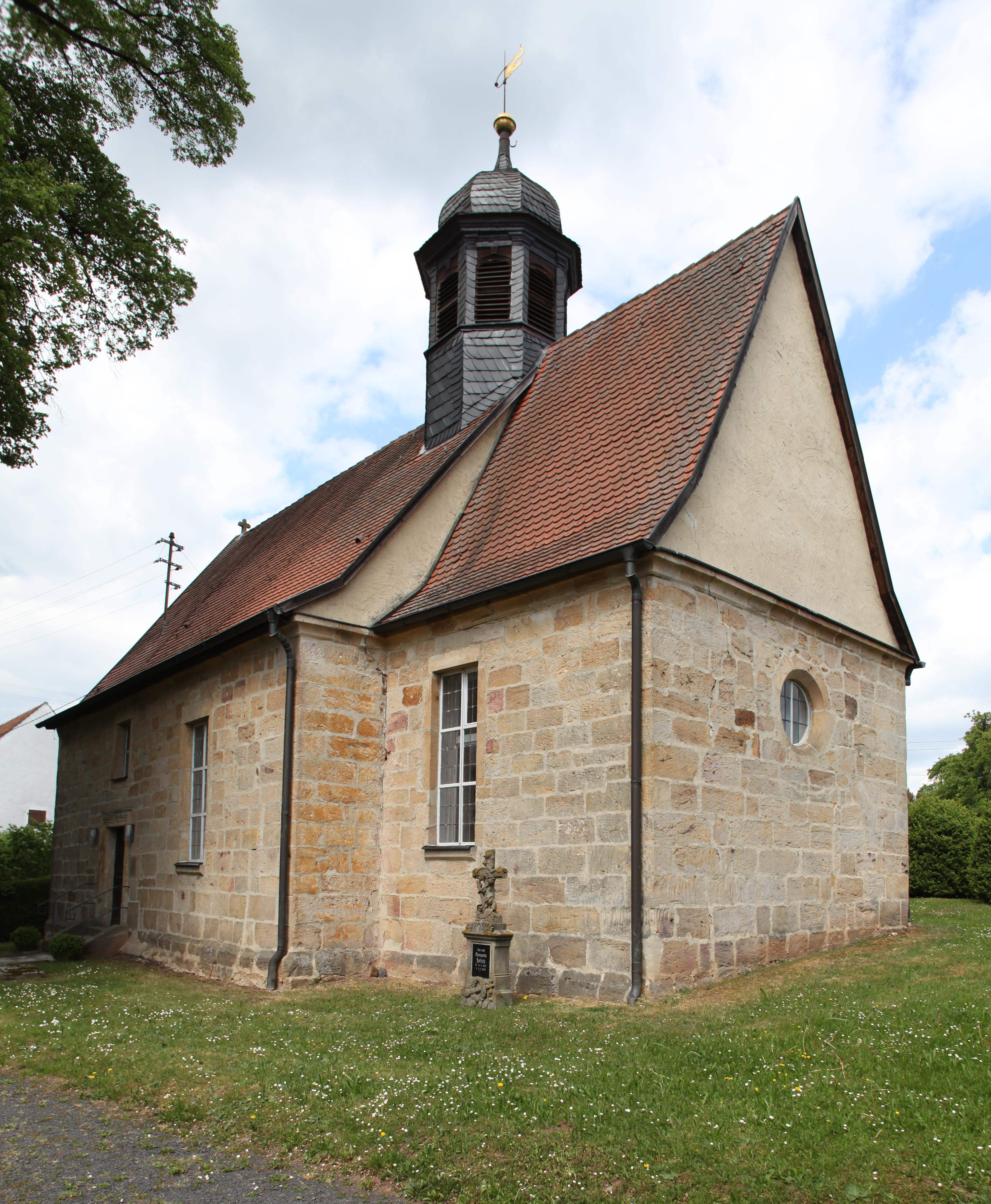 Evang.-Luth. Kirche, Bischwind, Landkreis Coburg